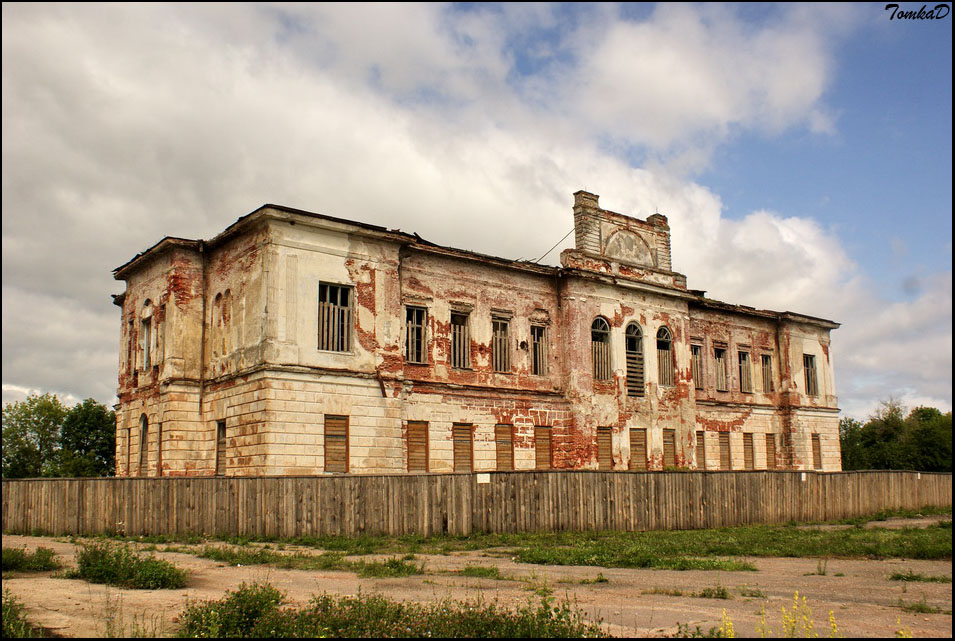 Нароўля. Сядзіба Горватаў